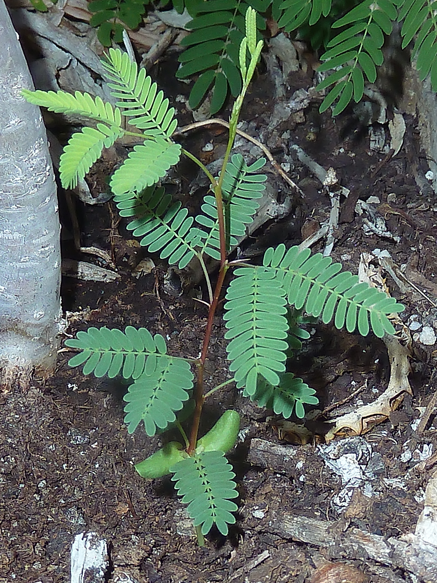 Vachellia farnesiana (Espinillo blanco) - Plántula - Águilas (Provincia de Murcia, España).